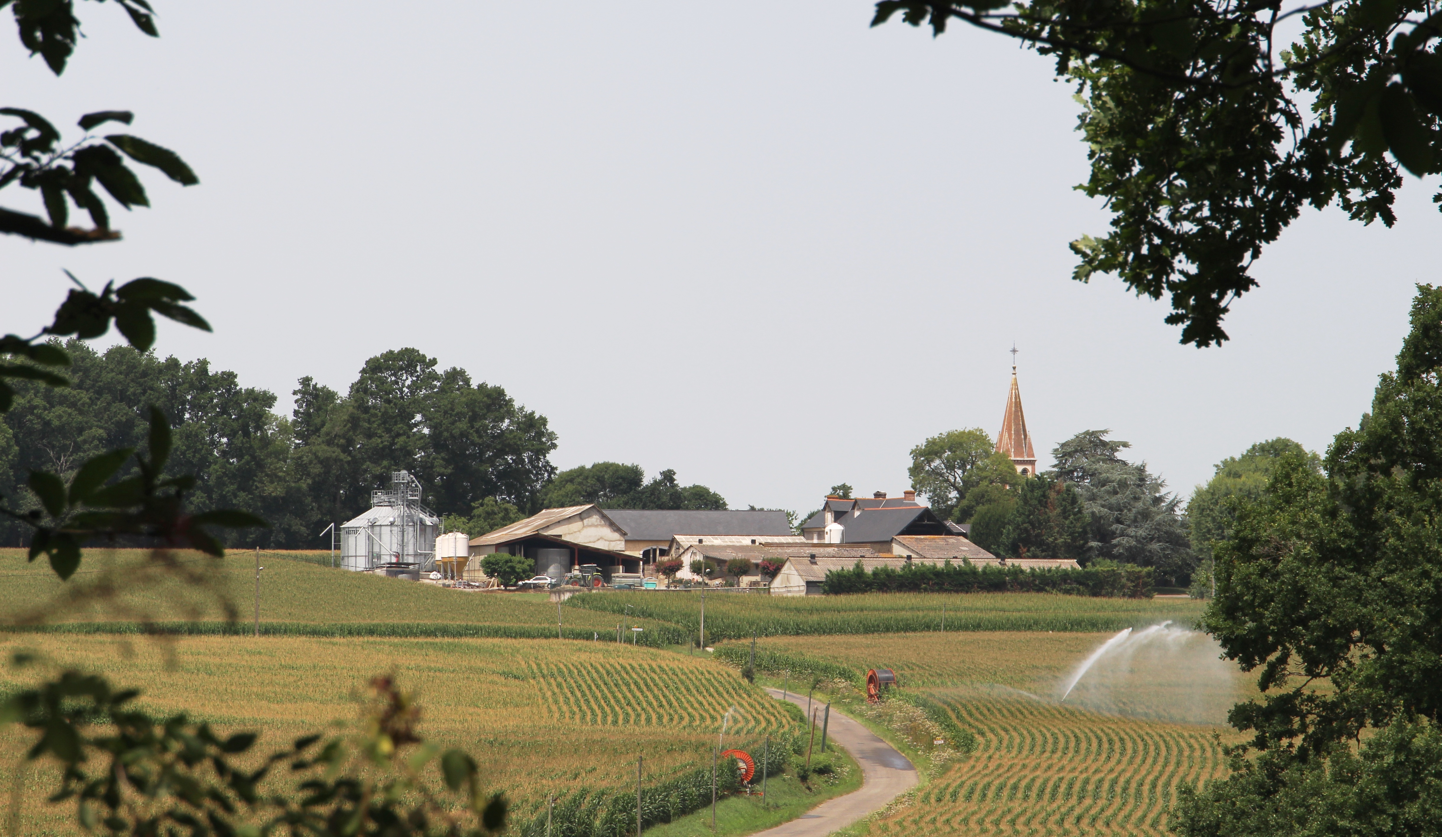 Oroix (Hautes-Pyrénées)